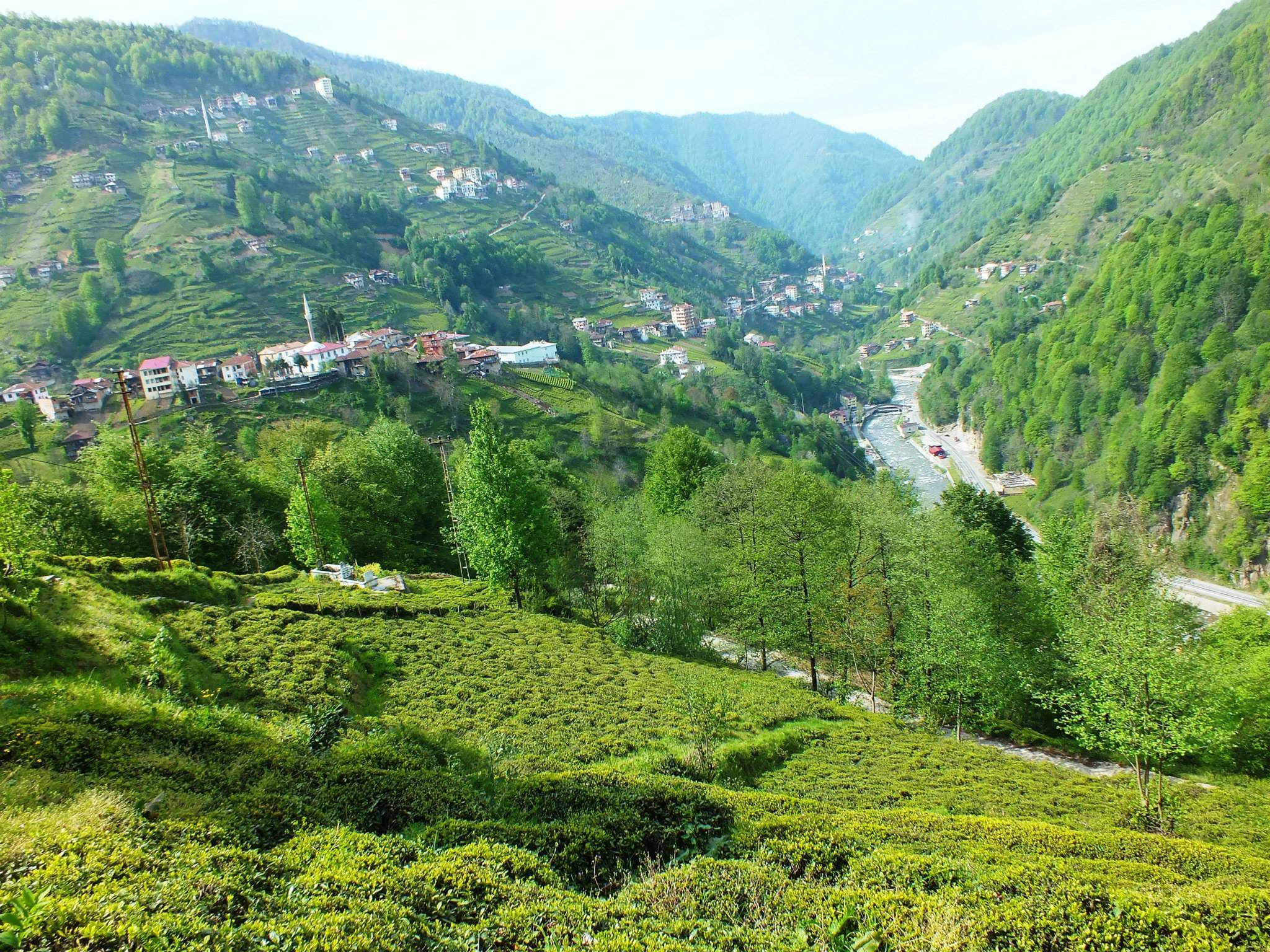 53690 Güneyce/İkizdere/Rize, Turkey